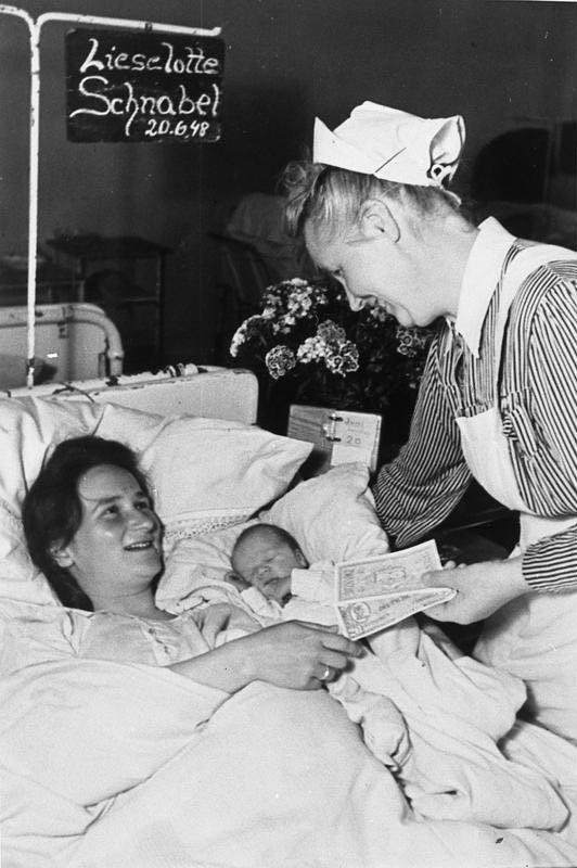 Auch Rainer erhielt sein Kopfgeld Alle Kinder, die am 20-6-48 geboren wurden, erhielten das Kopfgeld in Höhe von DM 40.- wie jeder Erwachsene. Eine Krankenschwester überreicht hier in einer Hamburger Klinik der glücklichen Mutter das neue Geld für ihren kleinen Rainer, der in den frühen Morgenstunden des 20. Juni das Licht der Welt erblickte. 20-6-48 Illus-dpd